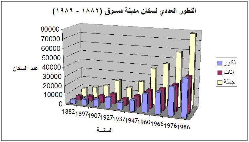 تطور عدد سكان مدينة دسوق في الفترة بين عاميّ 1882 إلى 1986م